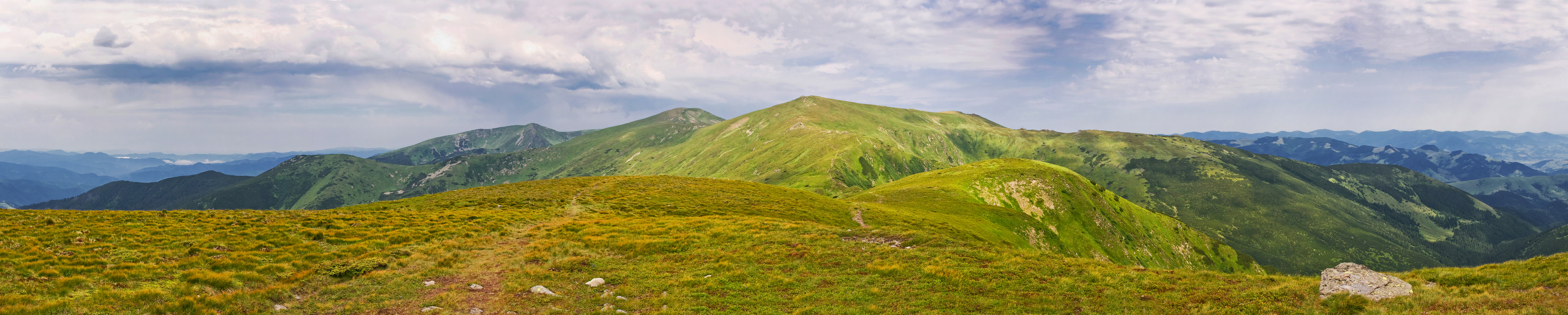 Карпатський біосферний заповідник, Рахівський, Тячівський, Хустський, Виноградівський райони